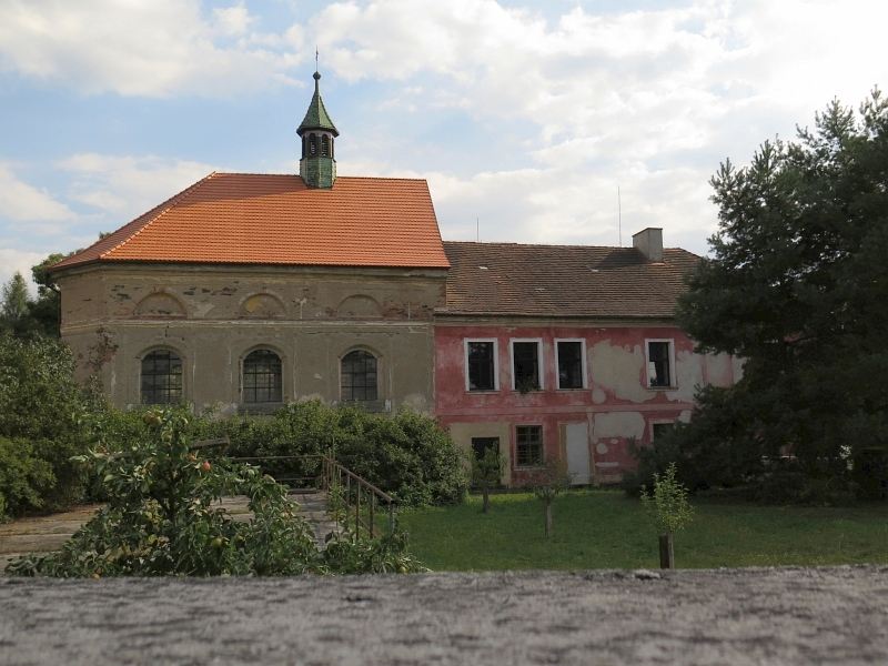 Zámek Újezd, Újezd (Horšice) čp. 20.